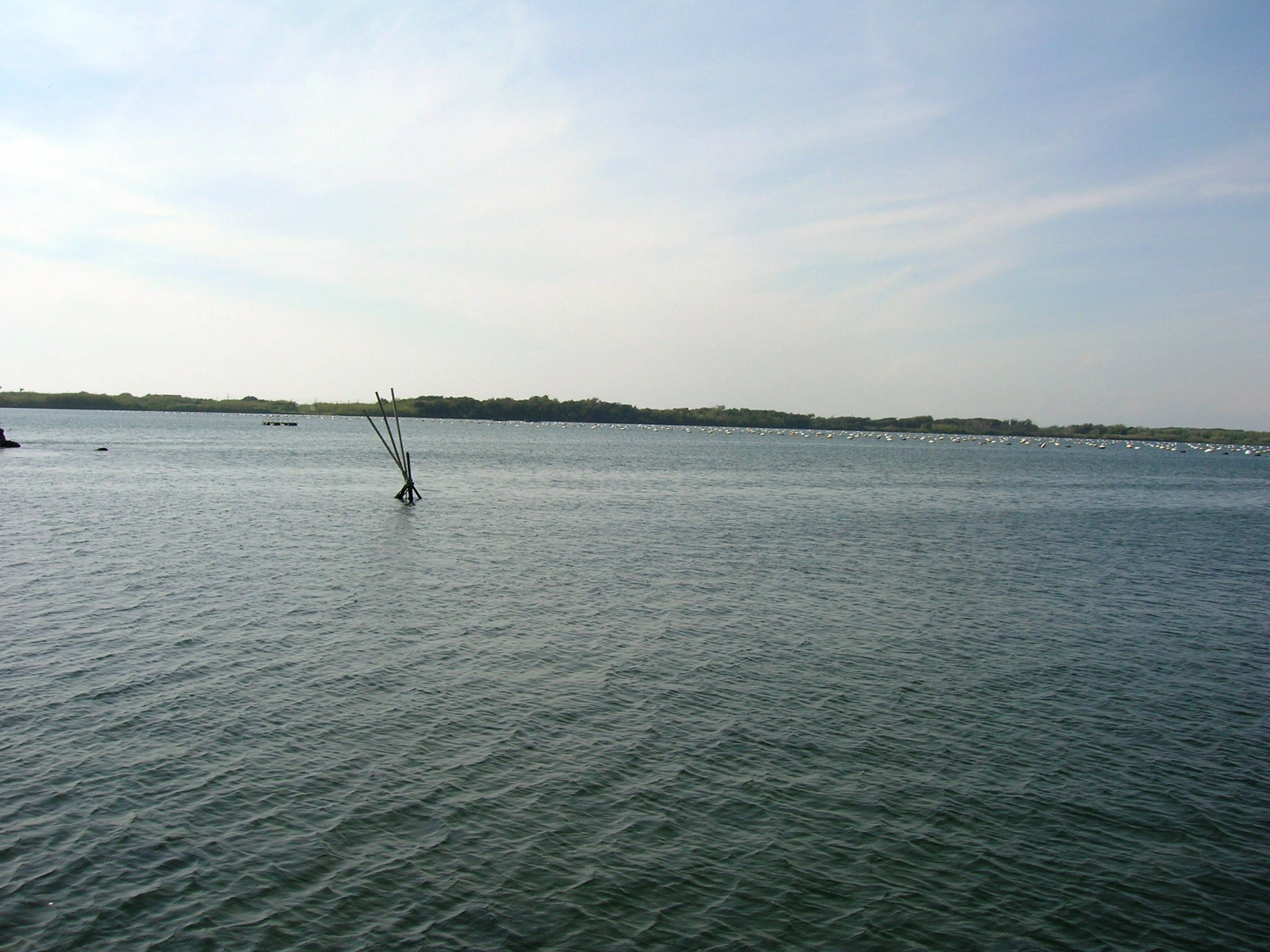 Lago Fusaro